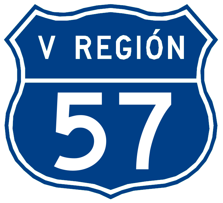 Escudo de la Ruta CH-57